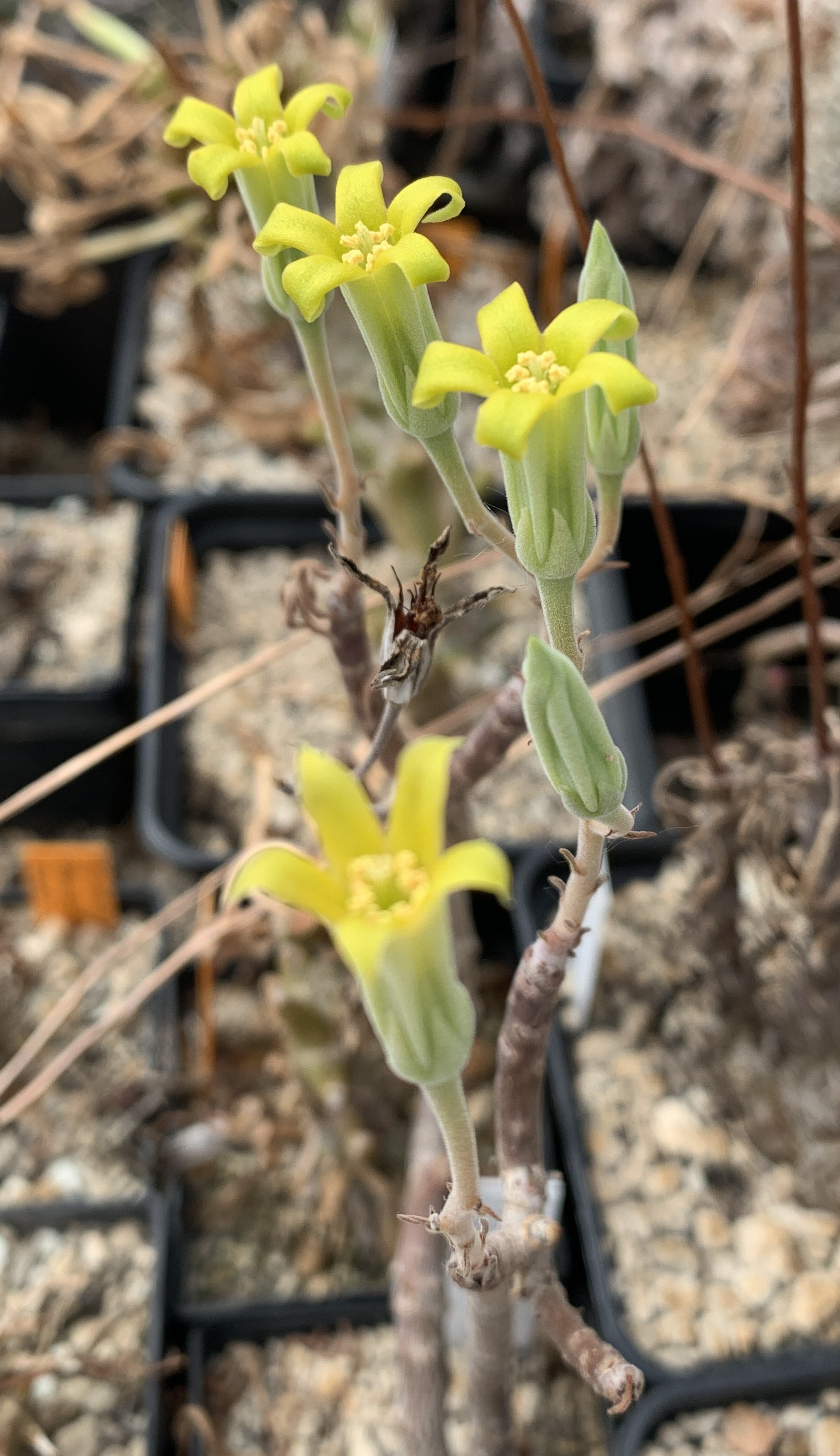 Blütenstand an Tylecodon viridiflorus in Kultur